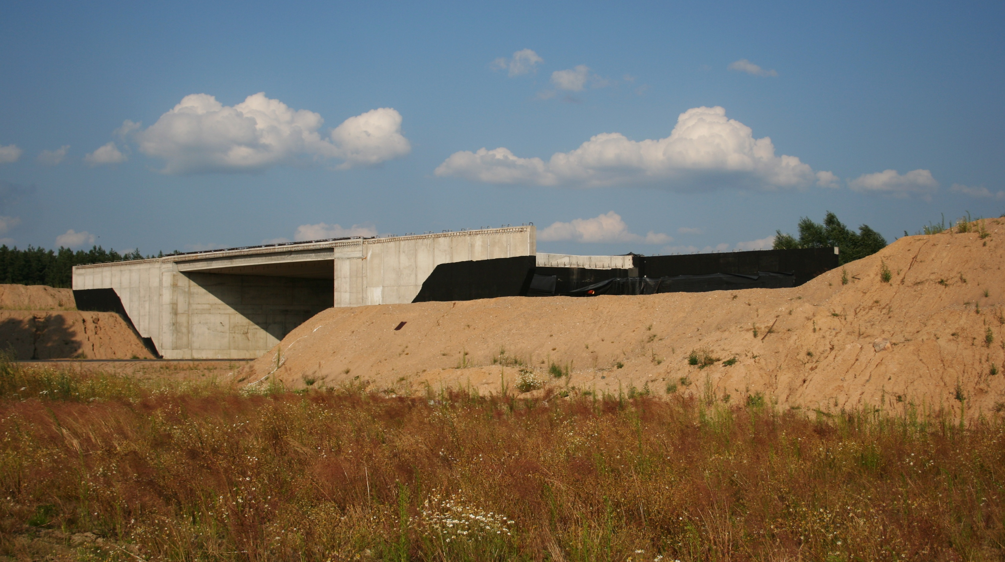 szkielet mostu na niedokończonej obwodnicy Augustowa przed Augustowem od strony zachodniej